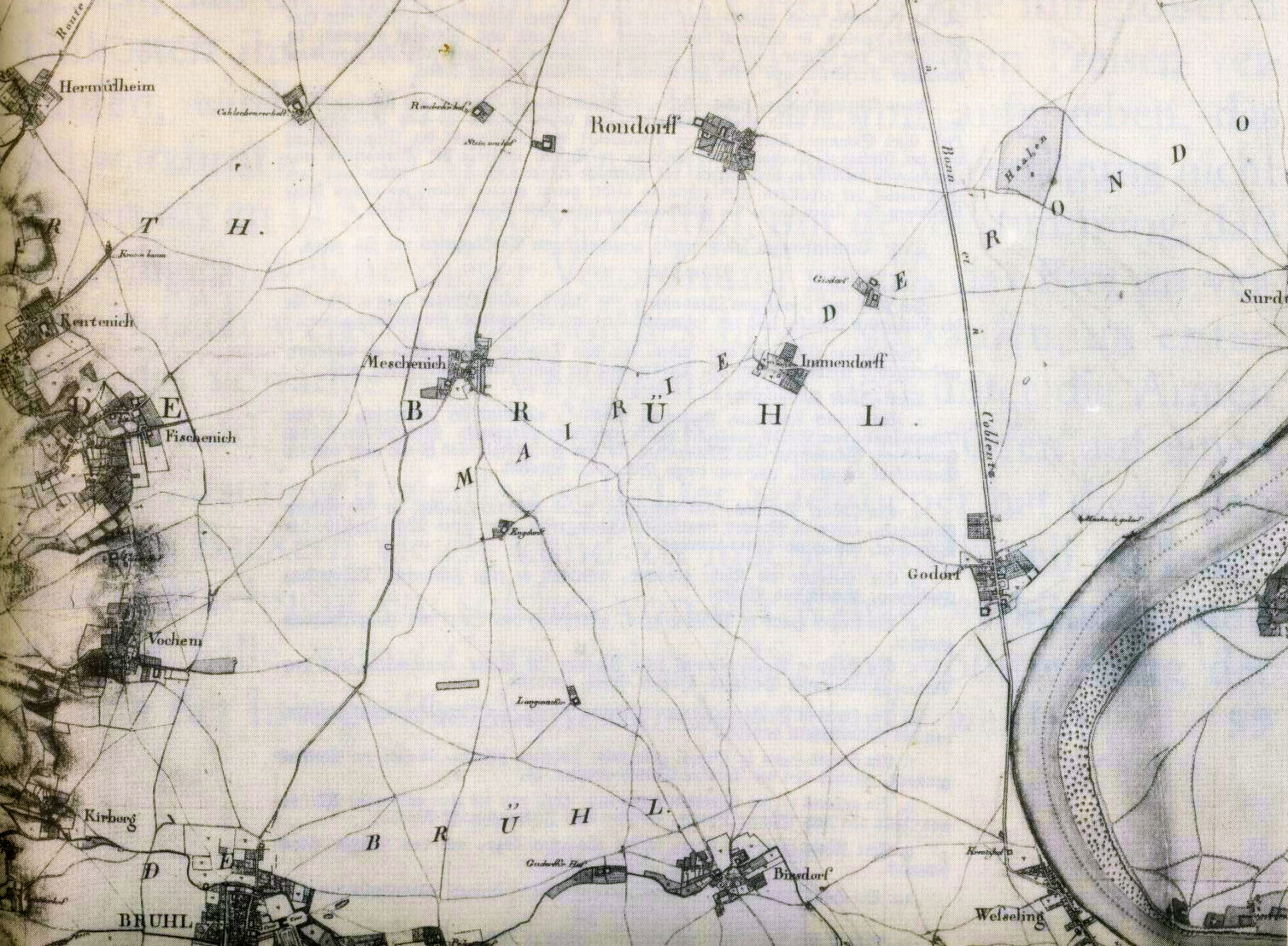 Kartenaufnahme der Rheinlande, Tranchot und von Müffling 1803-1820. Teilbereich des Kantons Brühl (Rheinland)